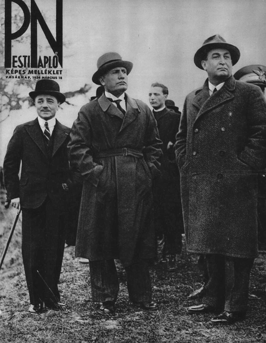 Engelbert Dollfuss osztrák kancellár, Benito Mussolini olasz vezető és Gömbös Gyula magyar miniszterelnök hármas találkozója Rómában, a képen egy Tor di Quintóban rendezett lovasünnepélyen vesznek részt